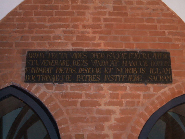 Das Foto zeigt eine Inschrift im Katharinenkloster in Stralsund im März 2007: ARDUA TECTA VIDES OPEROSAQUE FULCRA VIATOR STA VENERARE DEUS VINDICAT HANCCE DOMUM FUNDARAT PIETAS IPSIQUE ET MORIBUS ILLAM DOCTRINAEQUE PATRES INSTITUERE SACRAM